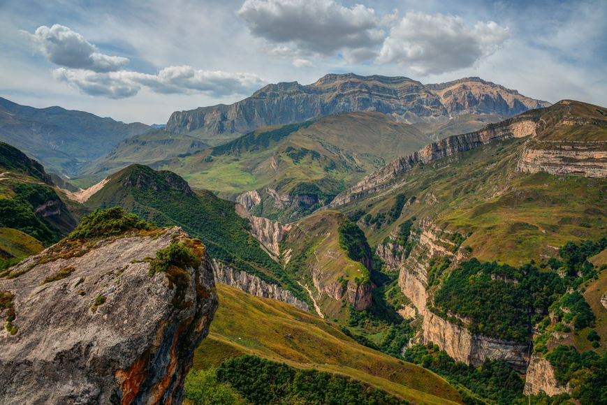 Шахдагский хребет